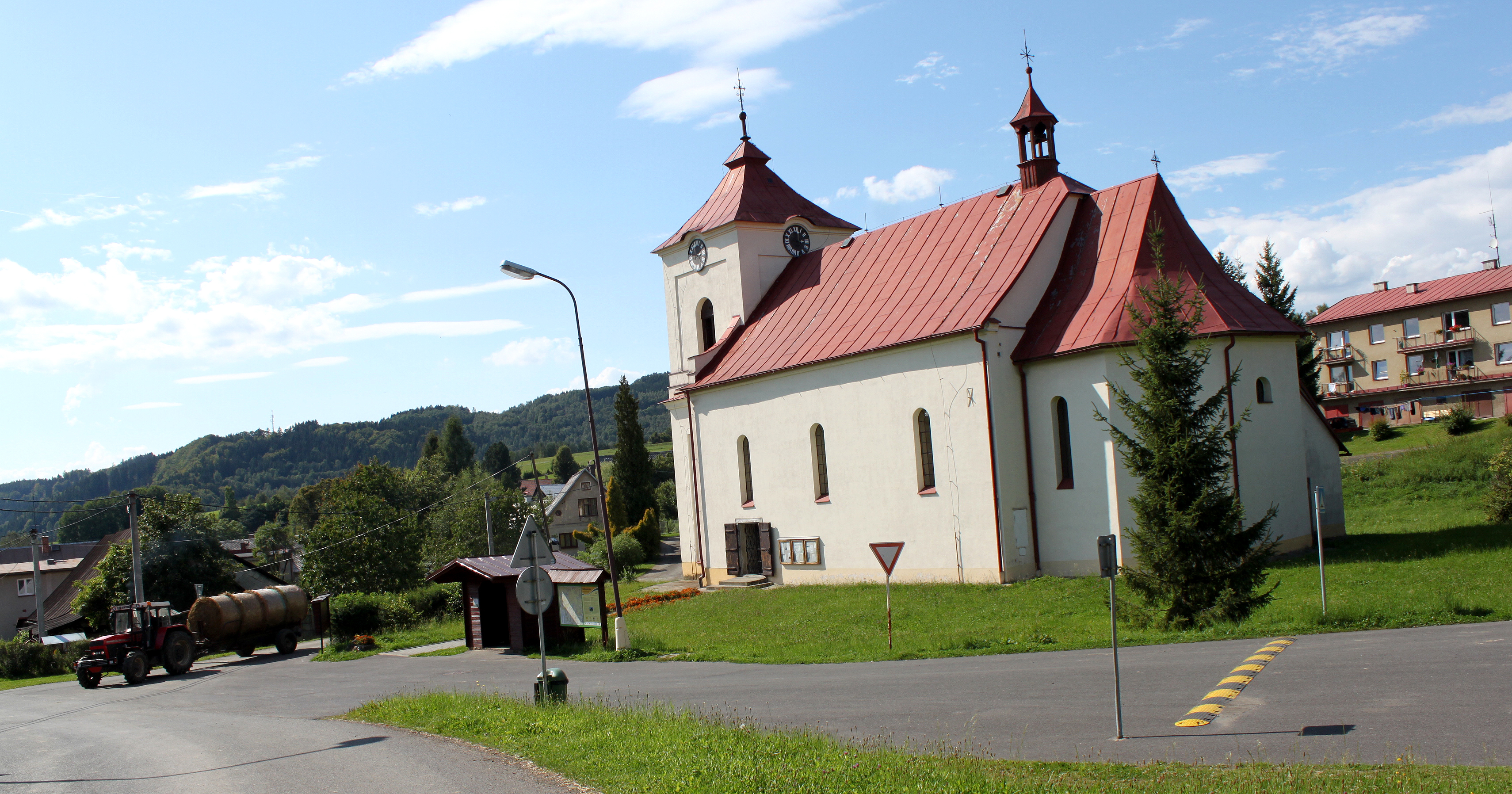 Poniklá, Czech Republic